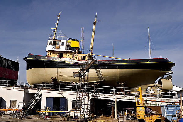 Remorqueur "Le Saint Gilles", collection du Musée maritime de La Rochelle - Charente Maritime - France